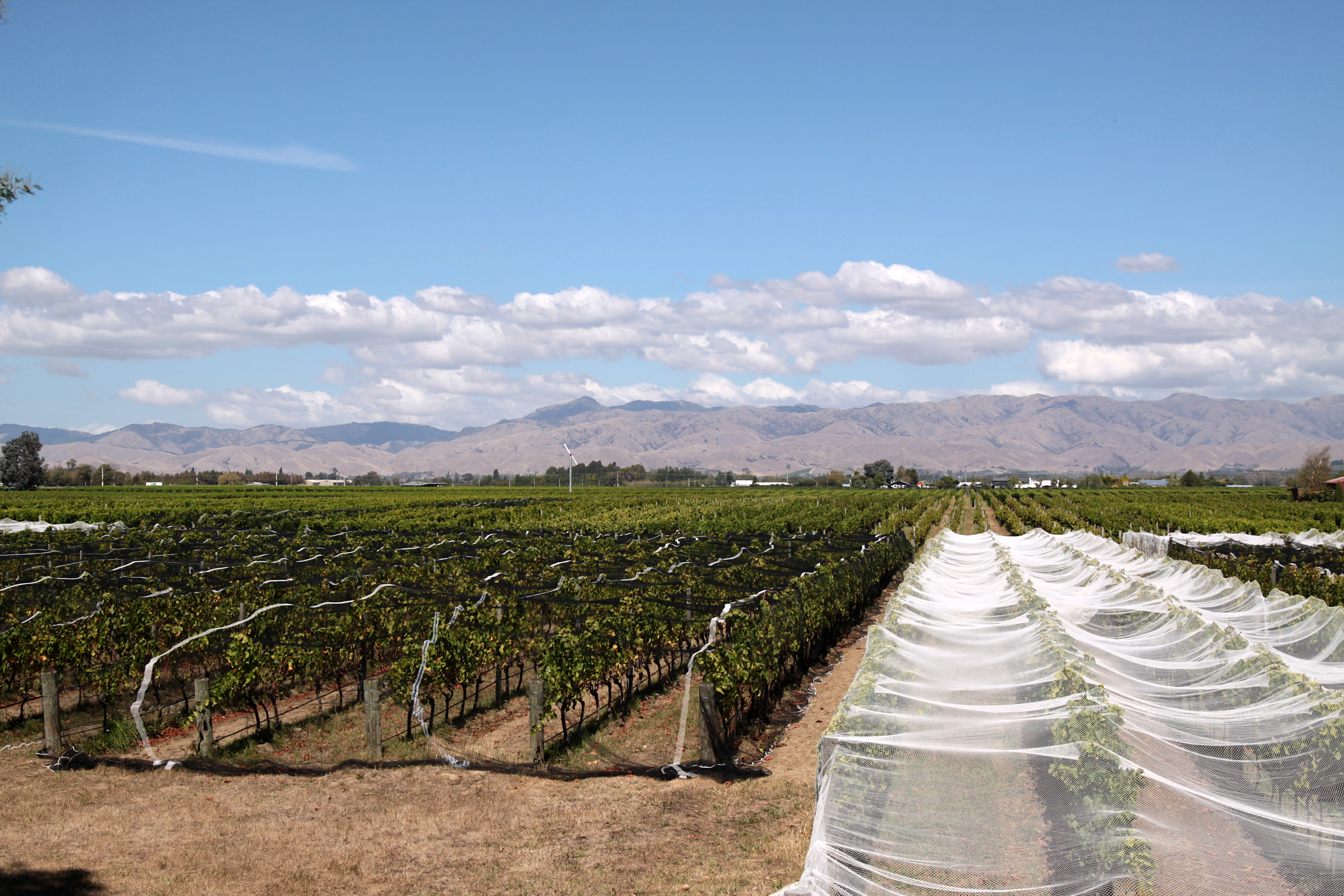 Filets anti-oiseau sur le vignoble de Marlborough